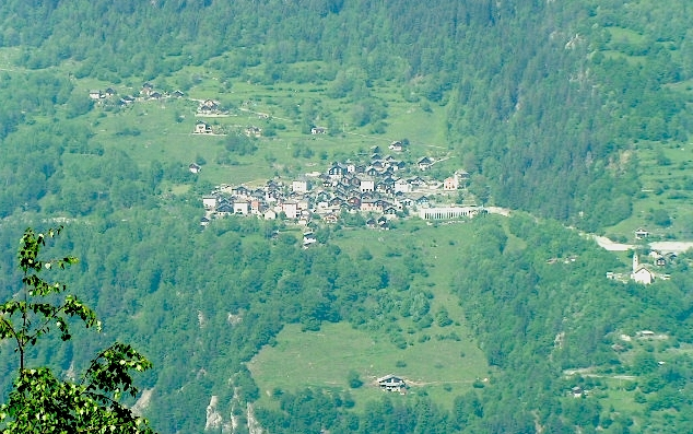 Anzonico